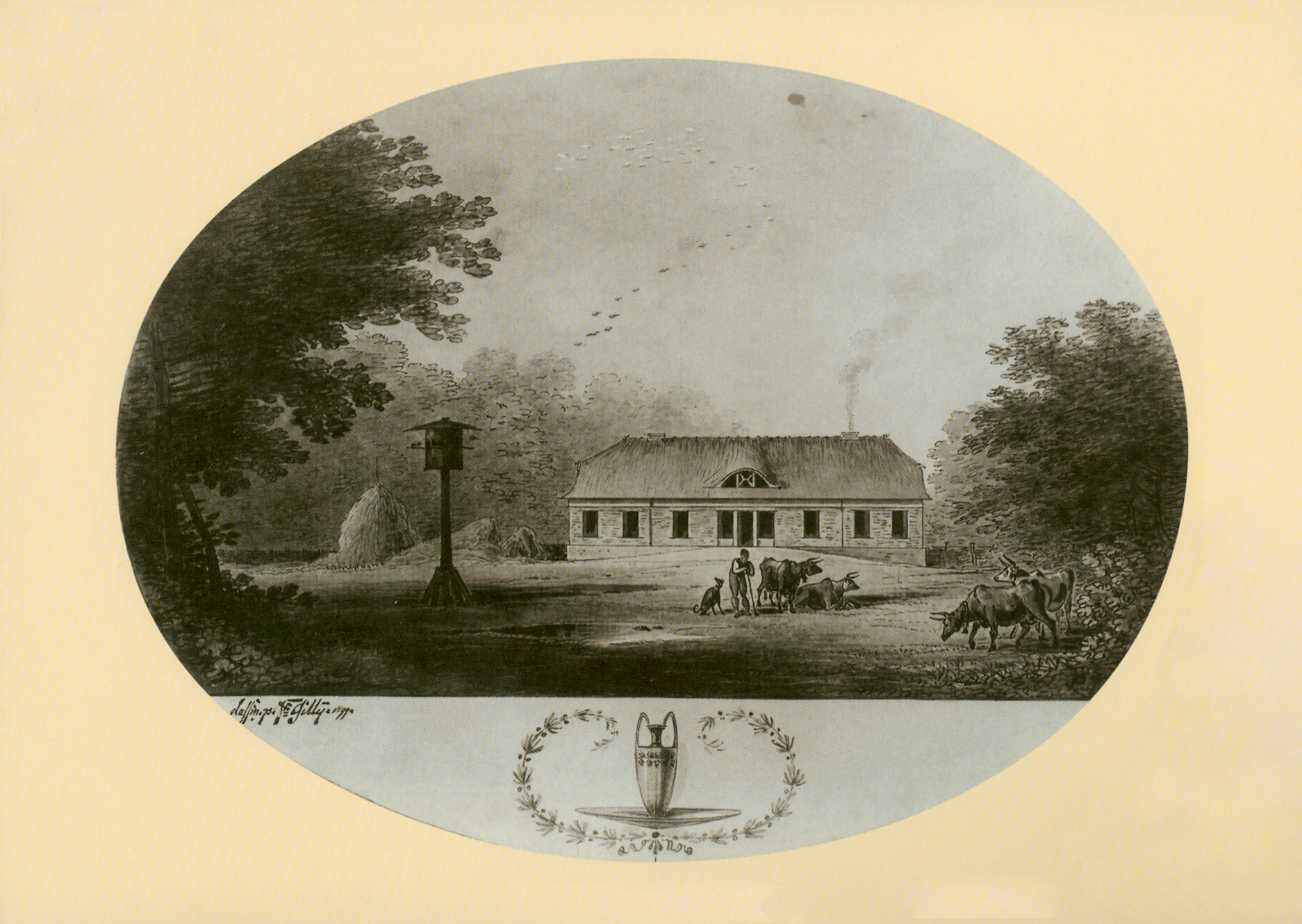 Friedrich Gilly, Meierei Louisa für den Park des Schlosses Bellevue, Hofseite, 1799.